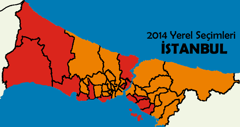 2014 seçim sonuçlarının ilçeler bazındaki bilgisini gösteren dosya.